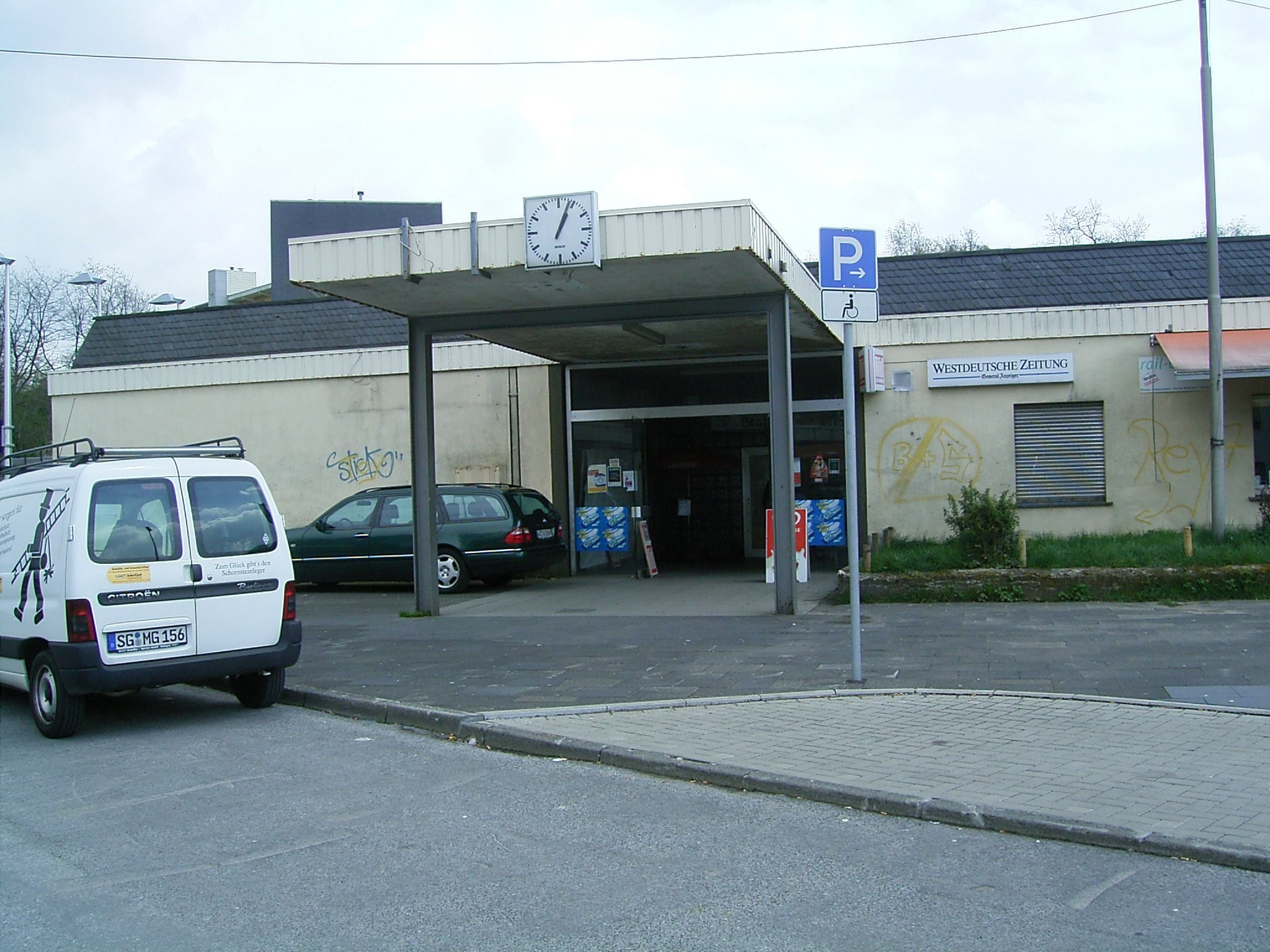 Wuppertal-Ronsdorf: Bahnhof